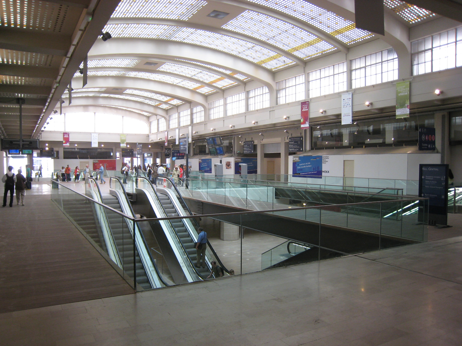 Hall central - Gare de l'Est